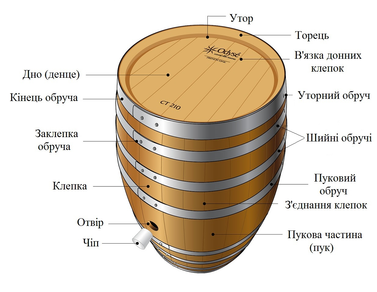 Опис будови винної бочки